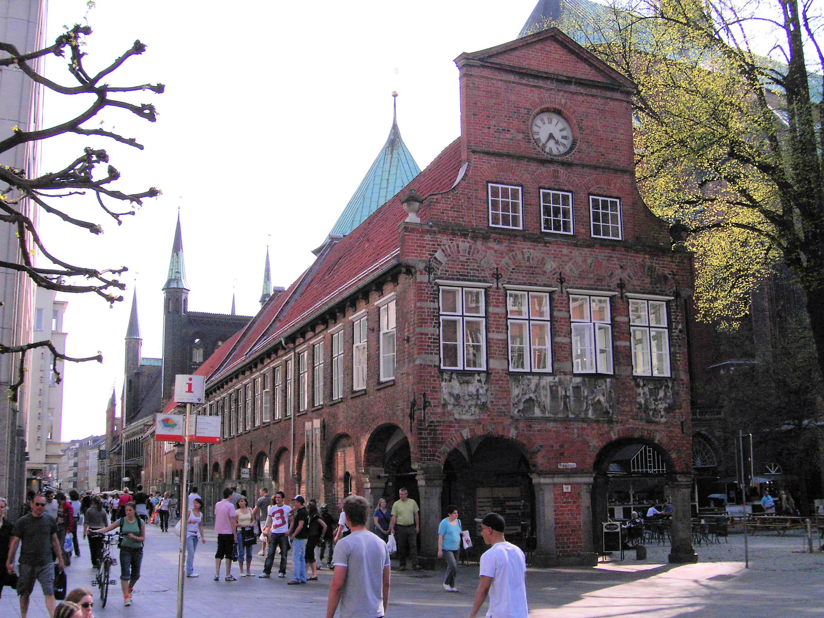 Lübeck, Kanzleigebäude (Chancery building) at Breite Str / Mengstr